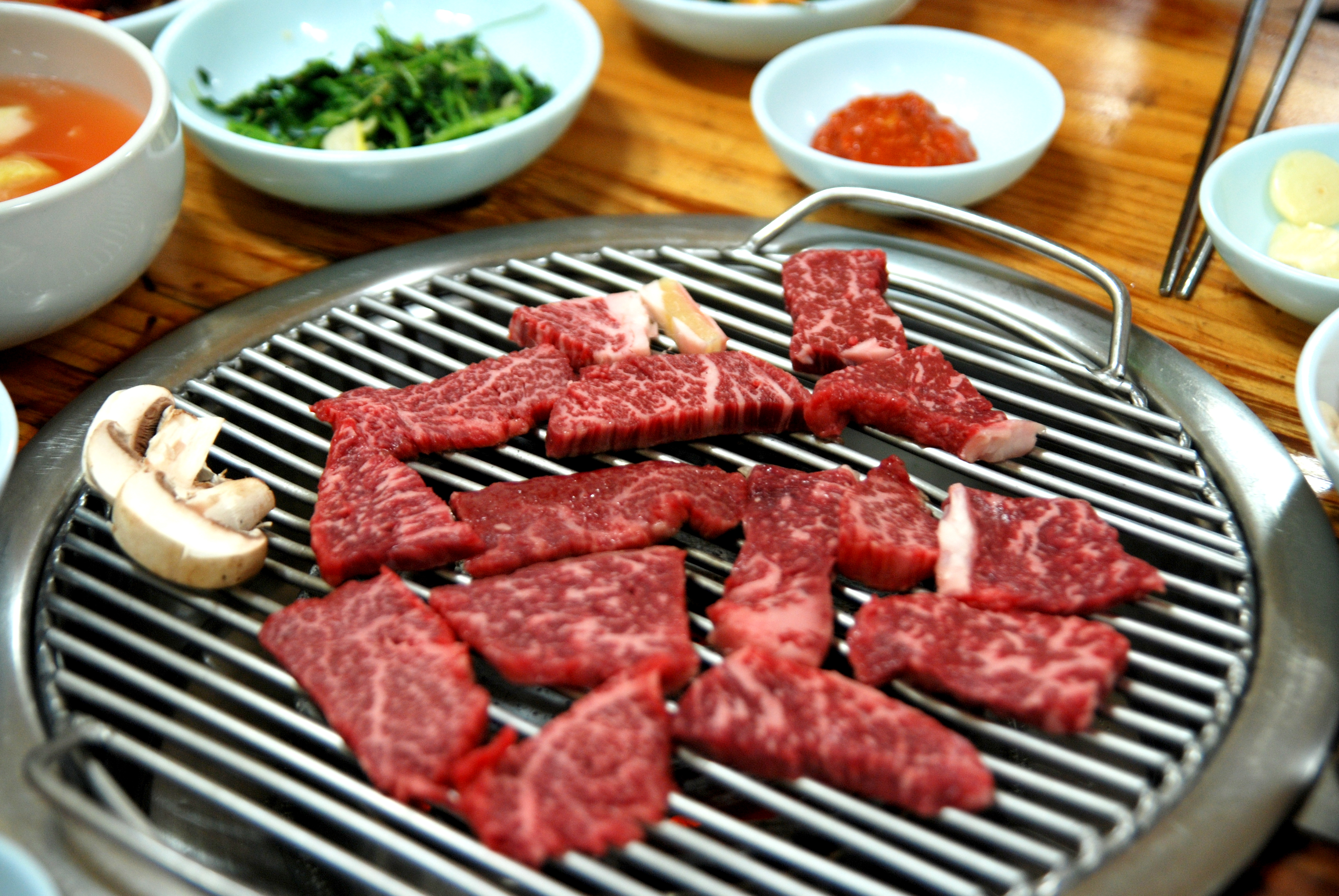 횡계 한우